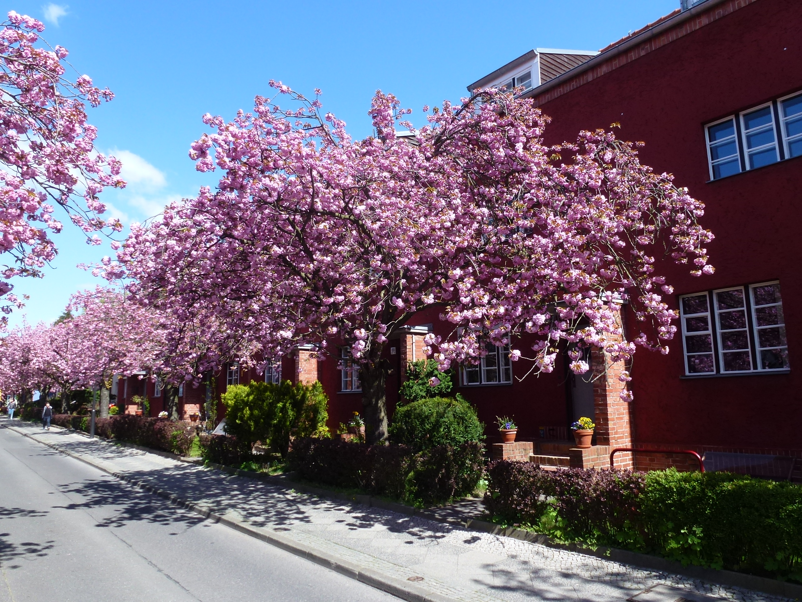 Berlin-Britz Onkel-Bräsig-Straße Baumblüte